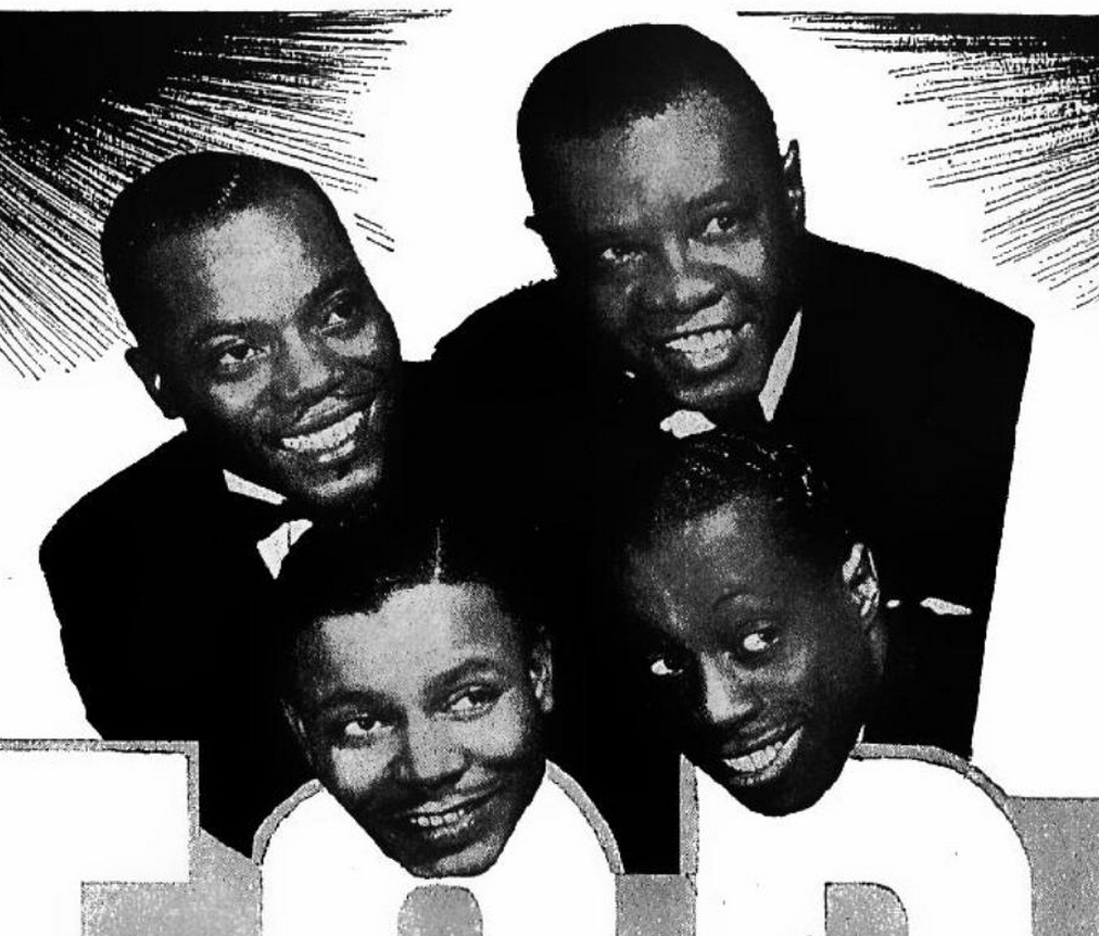 Golden Gate Quartet